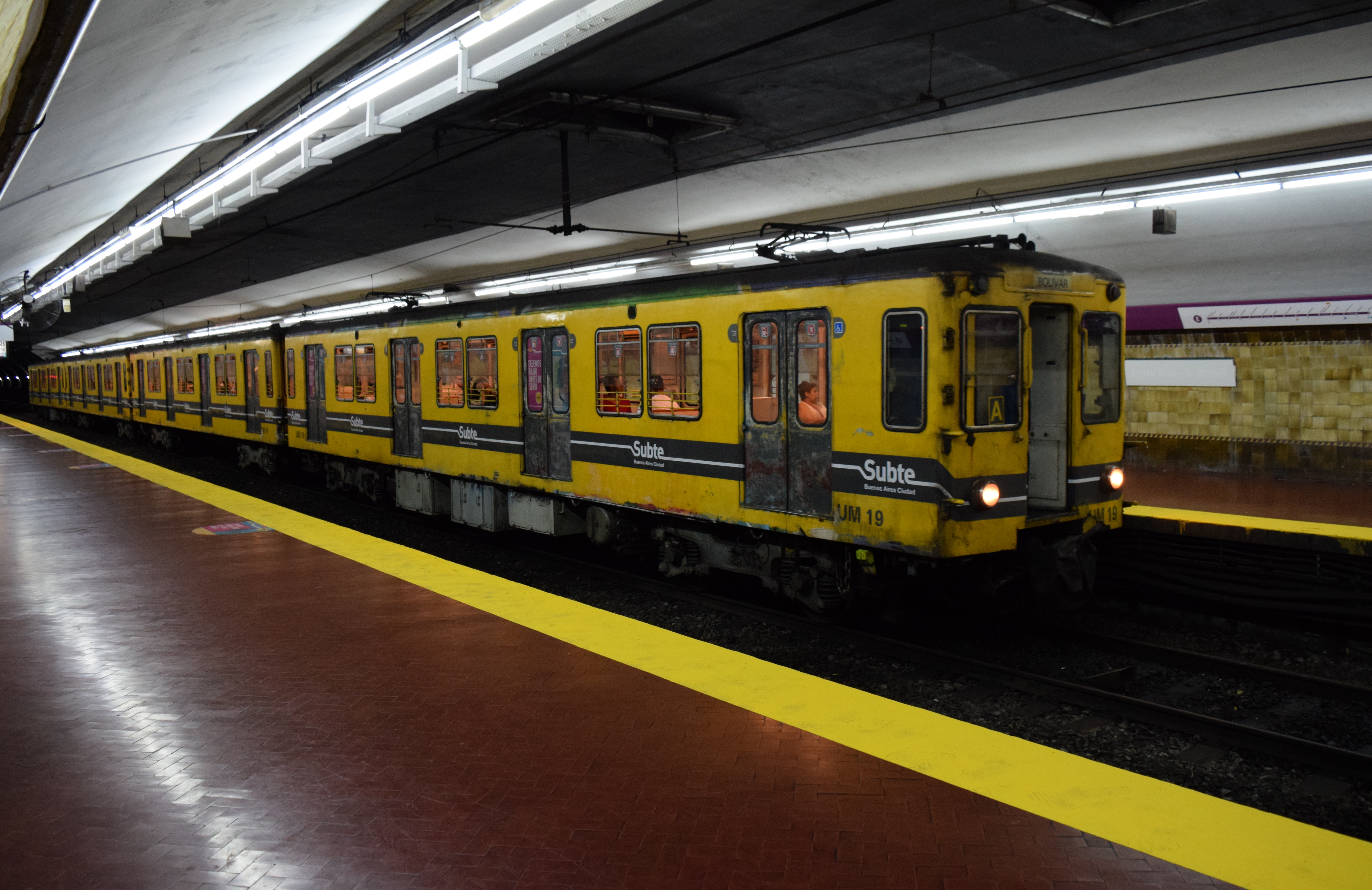 Coche GEE en la estación, rumbo a Bolivar.